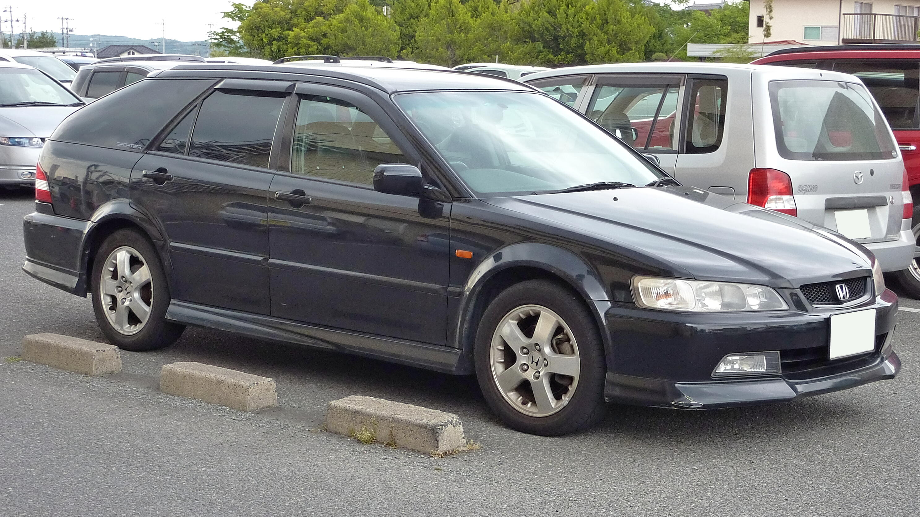 ホンダ・アコードワゴン（3代目・後期型）